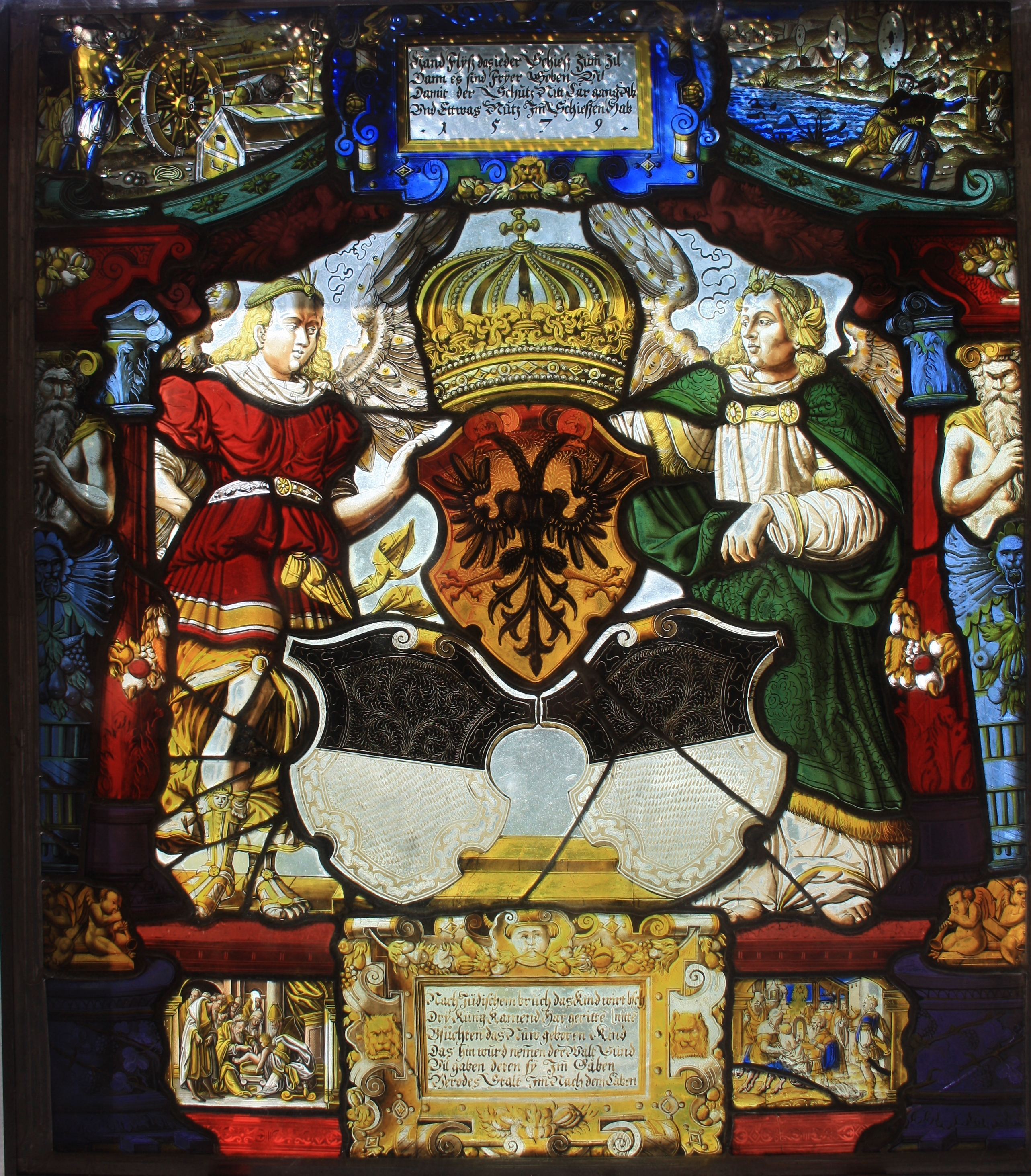 Wappenscheibe des Standes Freiburg im Kreuzgang des Klosters Wettingen: Ost IX 2